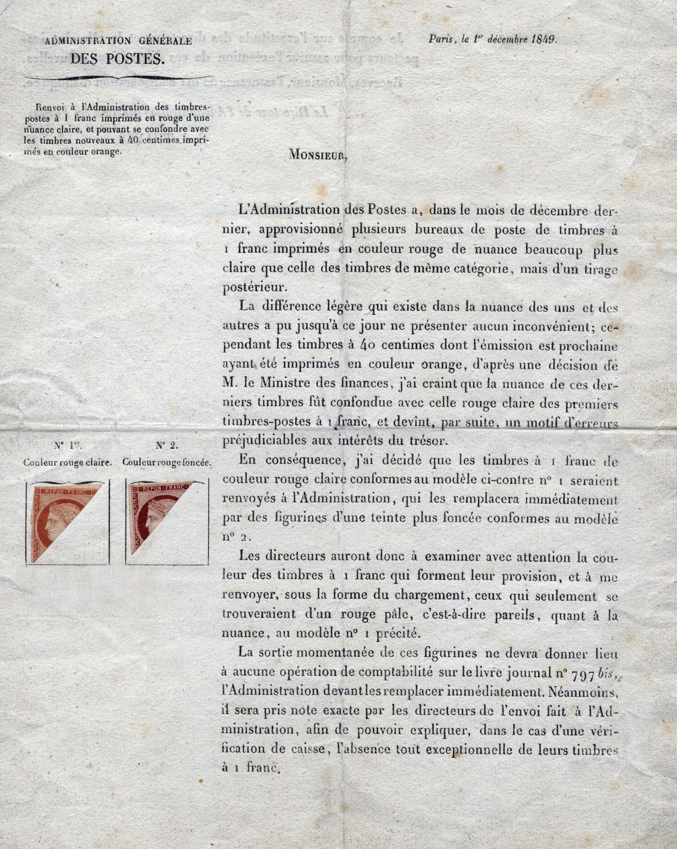 timbre poste France, retrait 1 franc rouge vermillon cérès